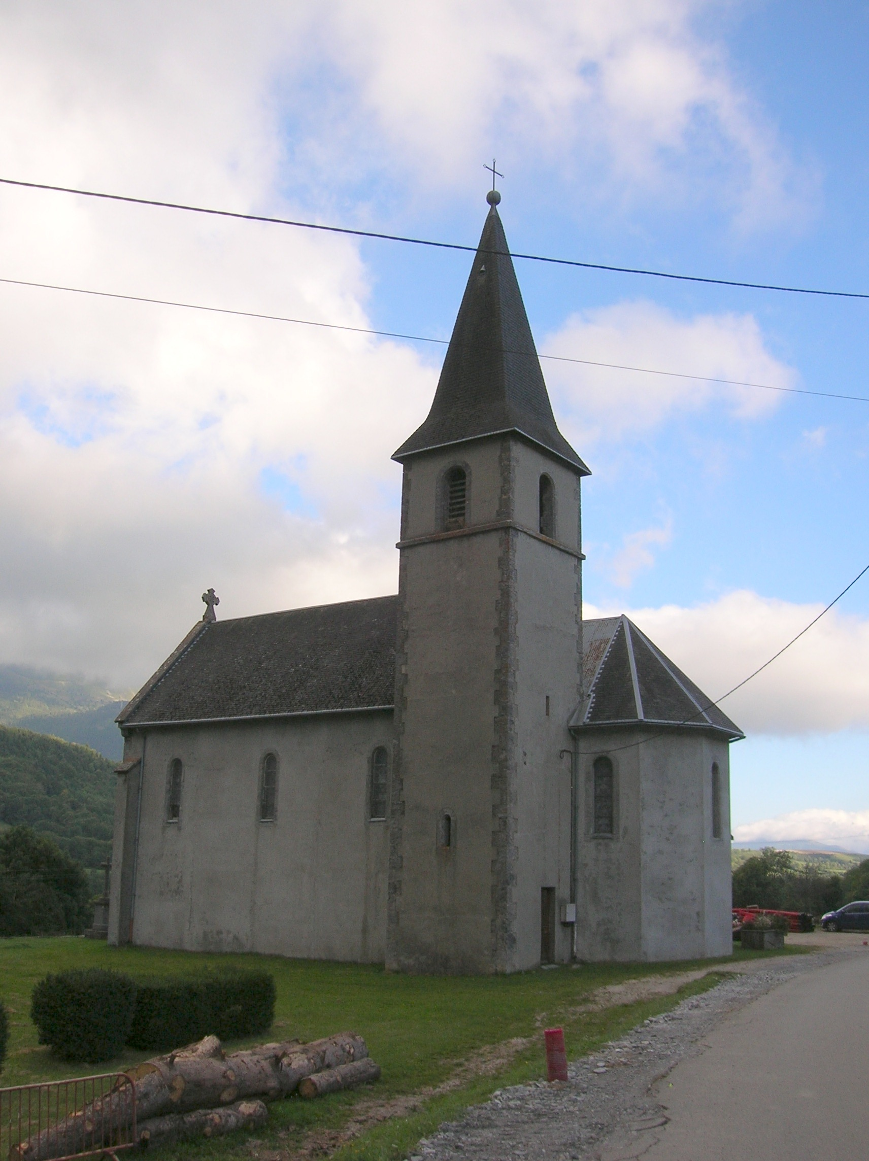 église de Saint-Théoffrey, Isère, France.